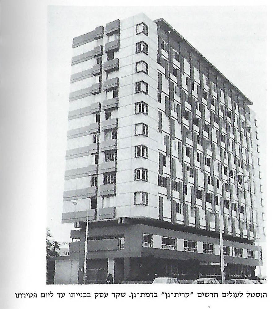 משפחת שקד בנתה ברמת גן